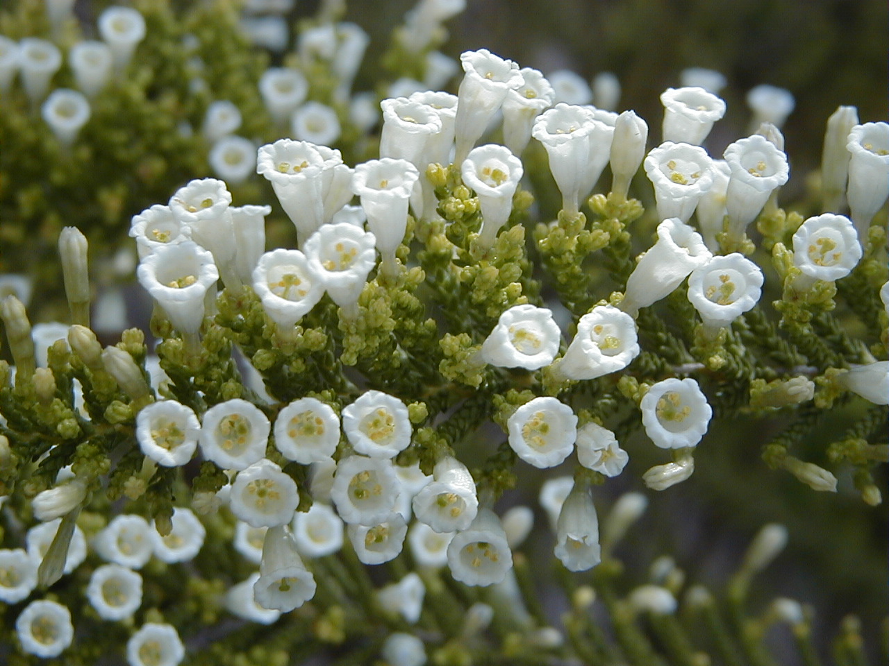 Fabiana imbricata.Real Jardín Botánico de Madrid.